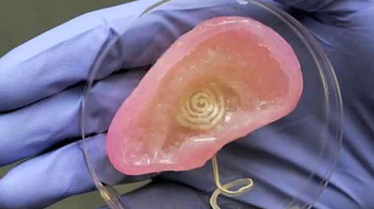 پرینت سه بعدی و پرینت از سمعک